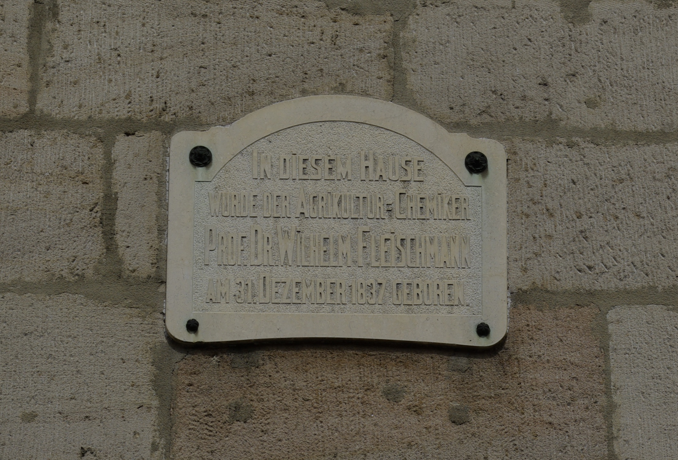 Gedenktafel für Wilhelm Fleischmann am Haus Hauptstraße 72 in Erlangen.